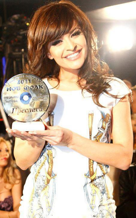 Преслава в Наградите "Нов фолк 2011" в 28 Mapт 2012